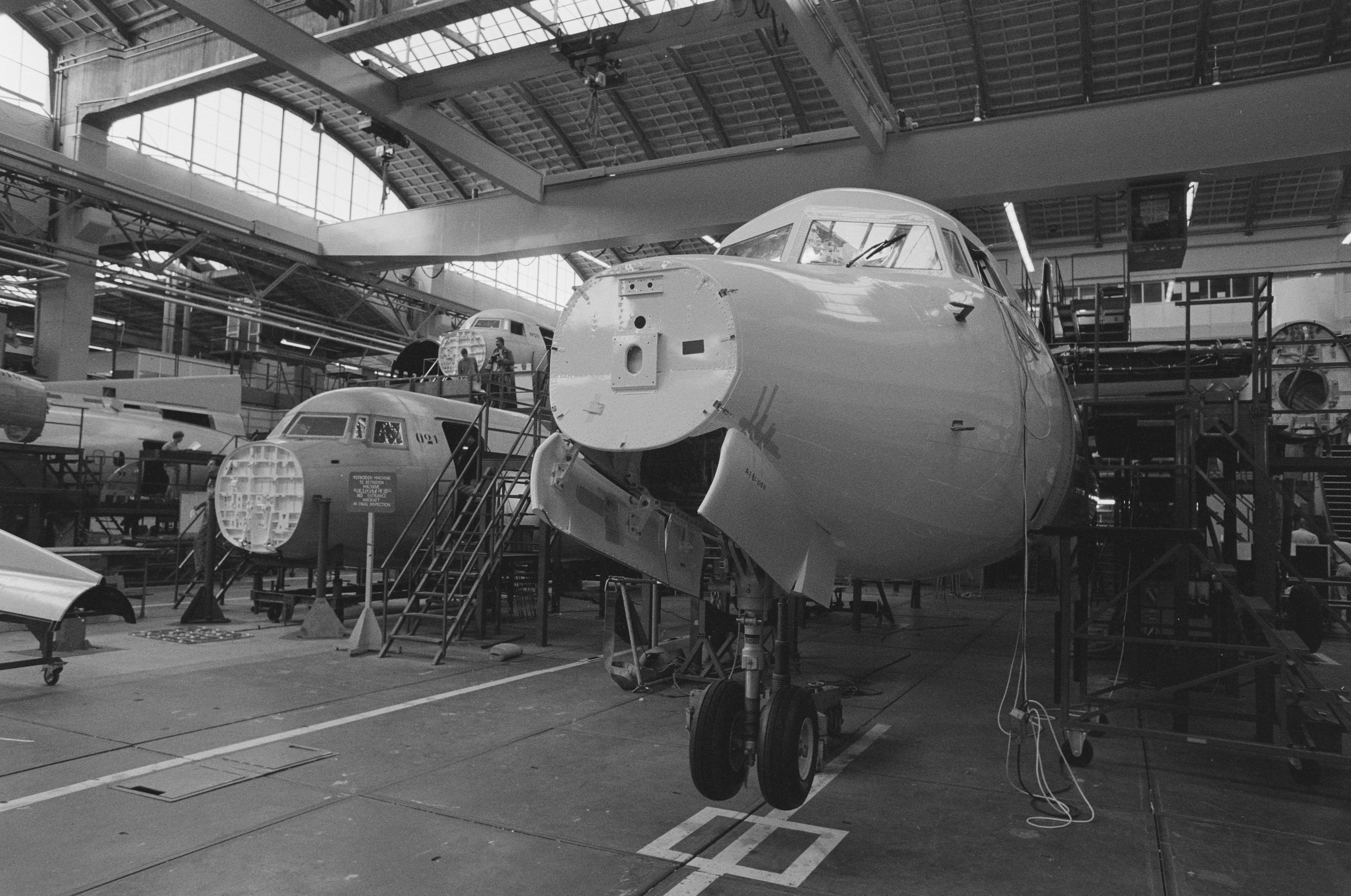 Collectie / Archief : Fotocollectie Anefo Reportage / Serie : [ onbekend ] Beschrijving : Overdracht 1e Fokker-50 aan DLT ( West Duitsland ); produktielijn Fokker-50 Datum : 6 augustus 1987 Locatie : B.R.D., Duitsland Trefwoorden : Overdrachten, vliegtuigen Persoonsnaam : Fokker 50 Fotograaf : Bogaerts, Rob / Anefo Auteursrechthebbende : Nationaal Archief Materiaalsoort : Negatief (zwart/wit) Nummer archiefinventaris : bekijk toegang 2.24.01.05 Bestanddeelnummer : 934-0469